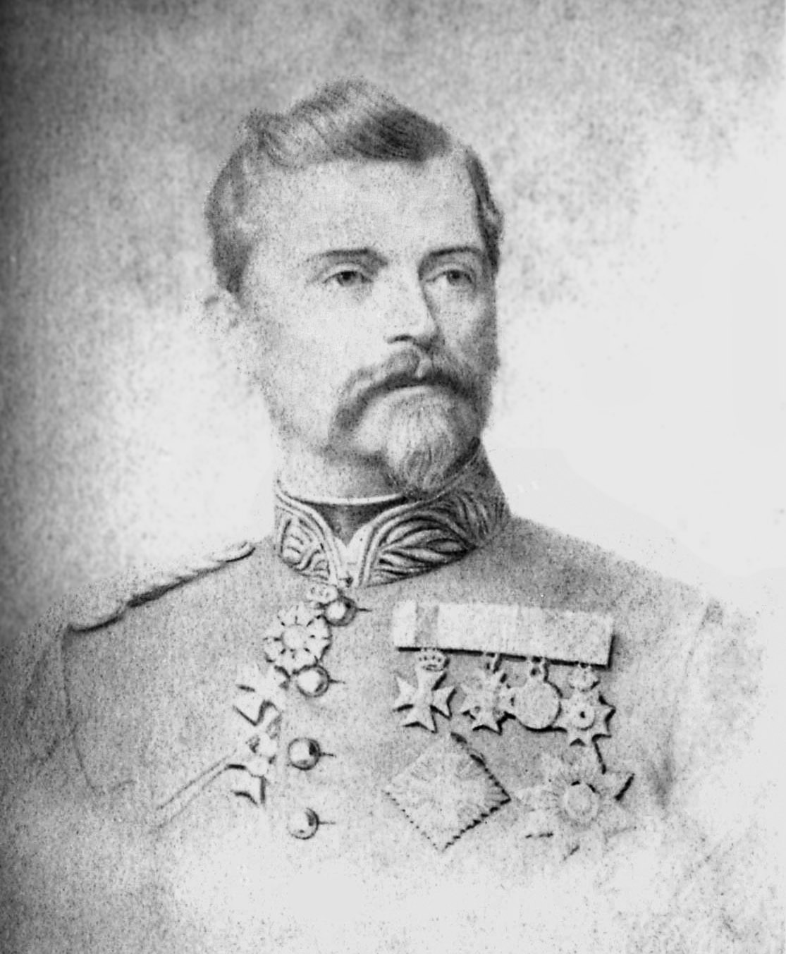 General Ludwig Freiherr von und zu der Tann-Rathsamhausen